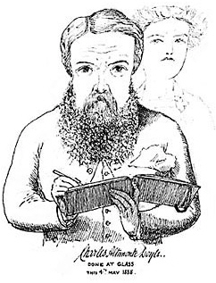 Charles Altamont Doyle (1832-1893), britischer Illustrator und Maler.